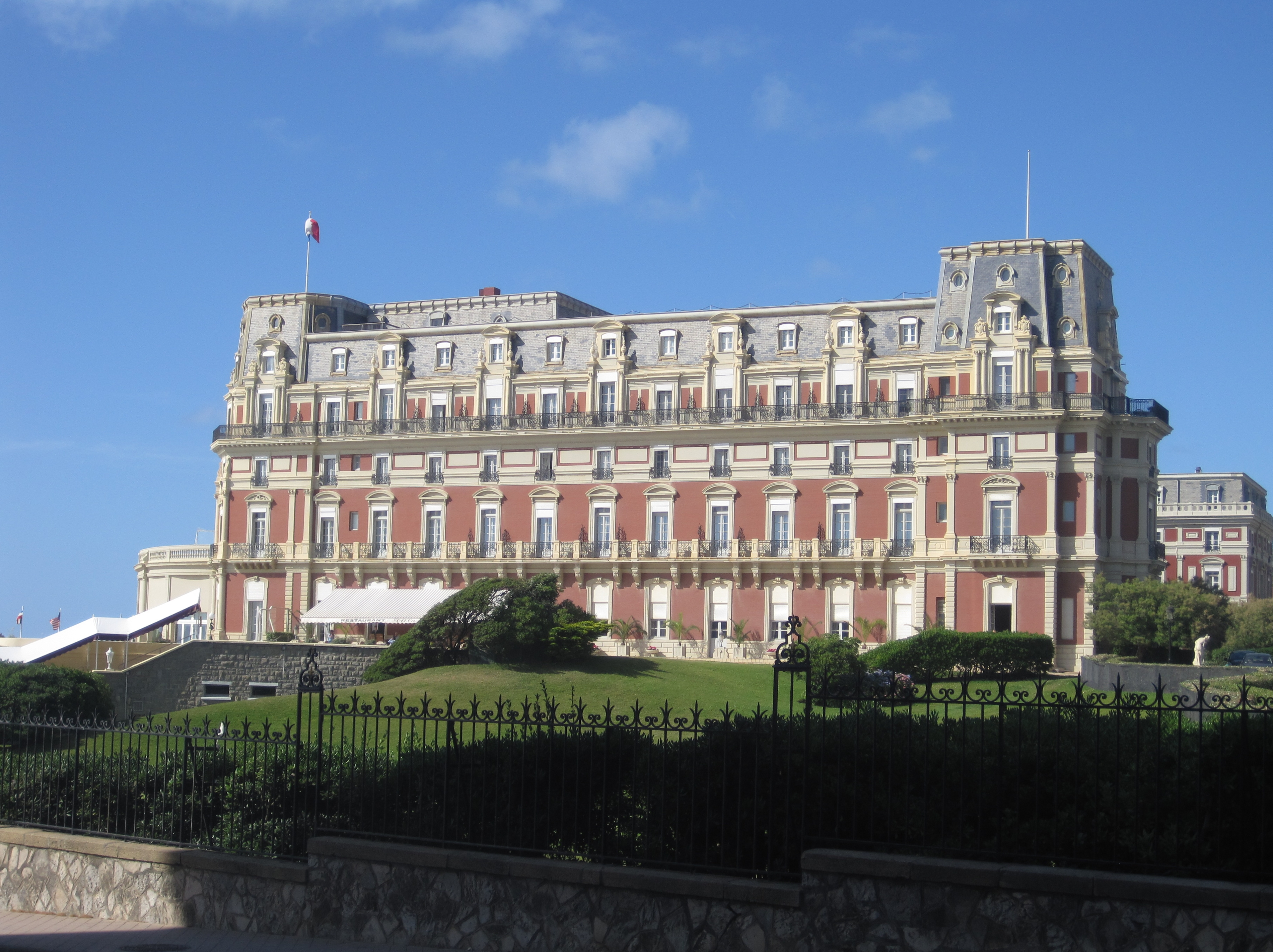 Facade de l'Hôtel du Palais, Biarritz, France .